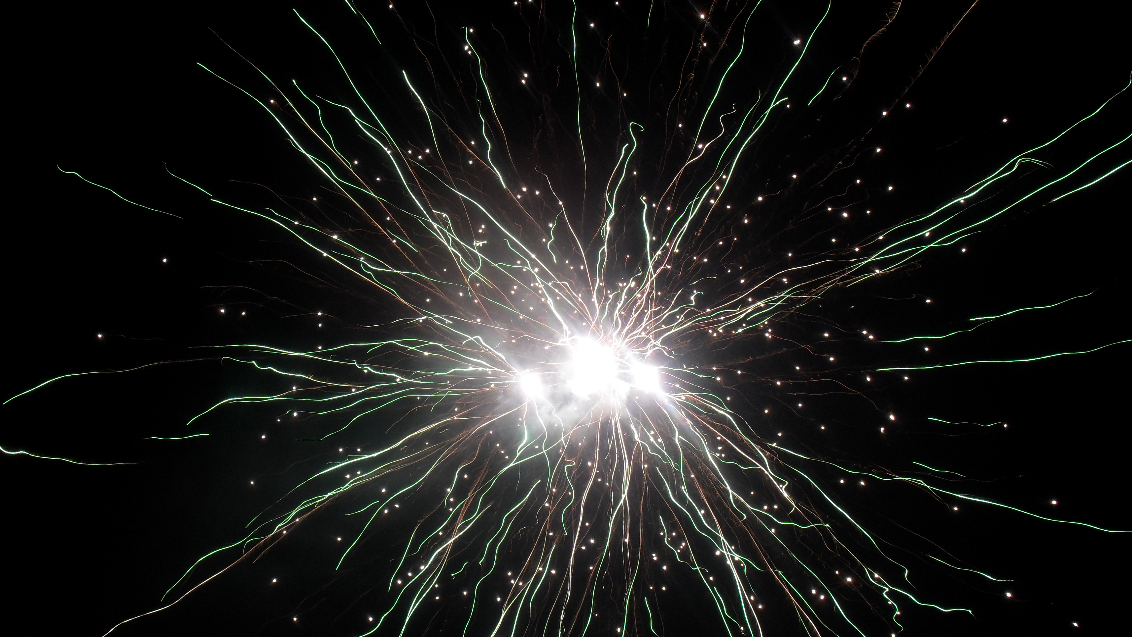 Fuegos artificiales de fin de año